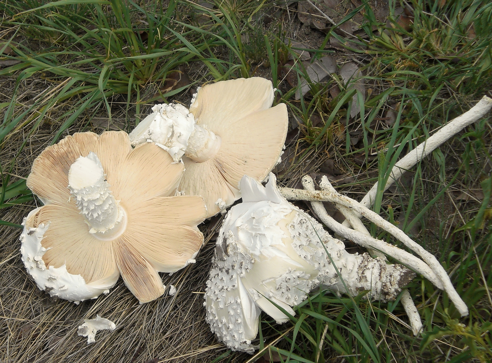 Omayova, Termitenpilz